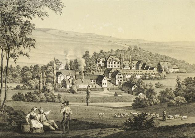 Eisenwerk Pfeilhammer Mitte des 19. Jahrhunderts / Eisenwerk Pfeilhammer mid-19th century